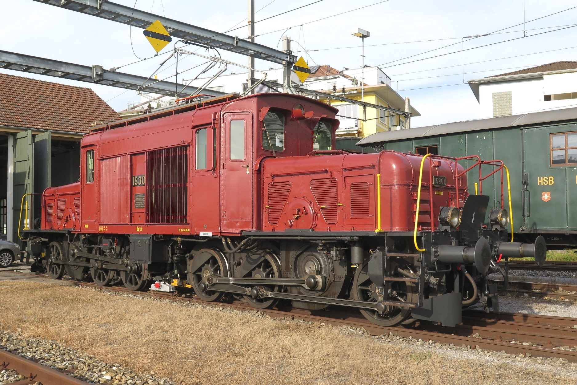 Seetal-Krokodil De 6/6 15301 der Schweizerischen Bundesbahnen, ehemals Seetalbahn, anlässlich des 9. Remisefest und der 2. Modelleisenbahnausstellung in Hochdorf bei Luzern in der Schweiz. Die Lokomotive ist seit 1983 im Eigentum der Oensingen–Balsthal-Bahn und seit 2016 in Hochdorf stationiert. Sie wird dort vom Verein Historische Seethalbahn betreut.